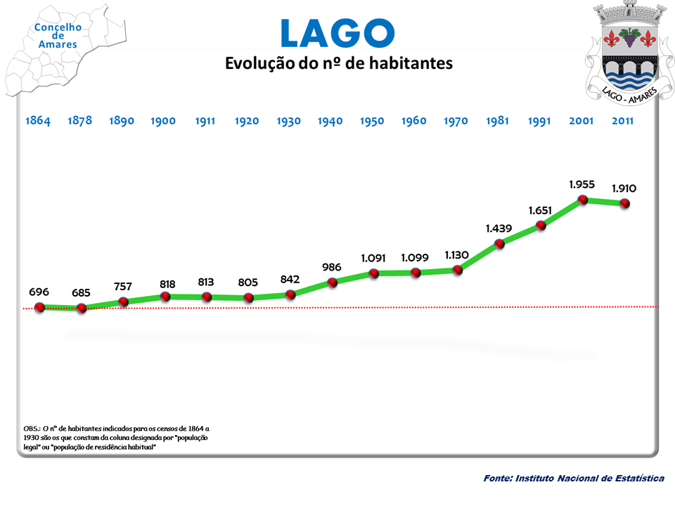 Censo 2011